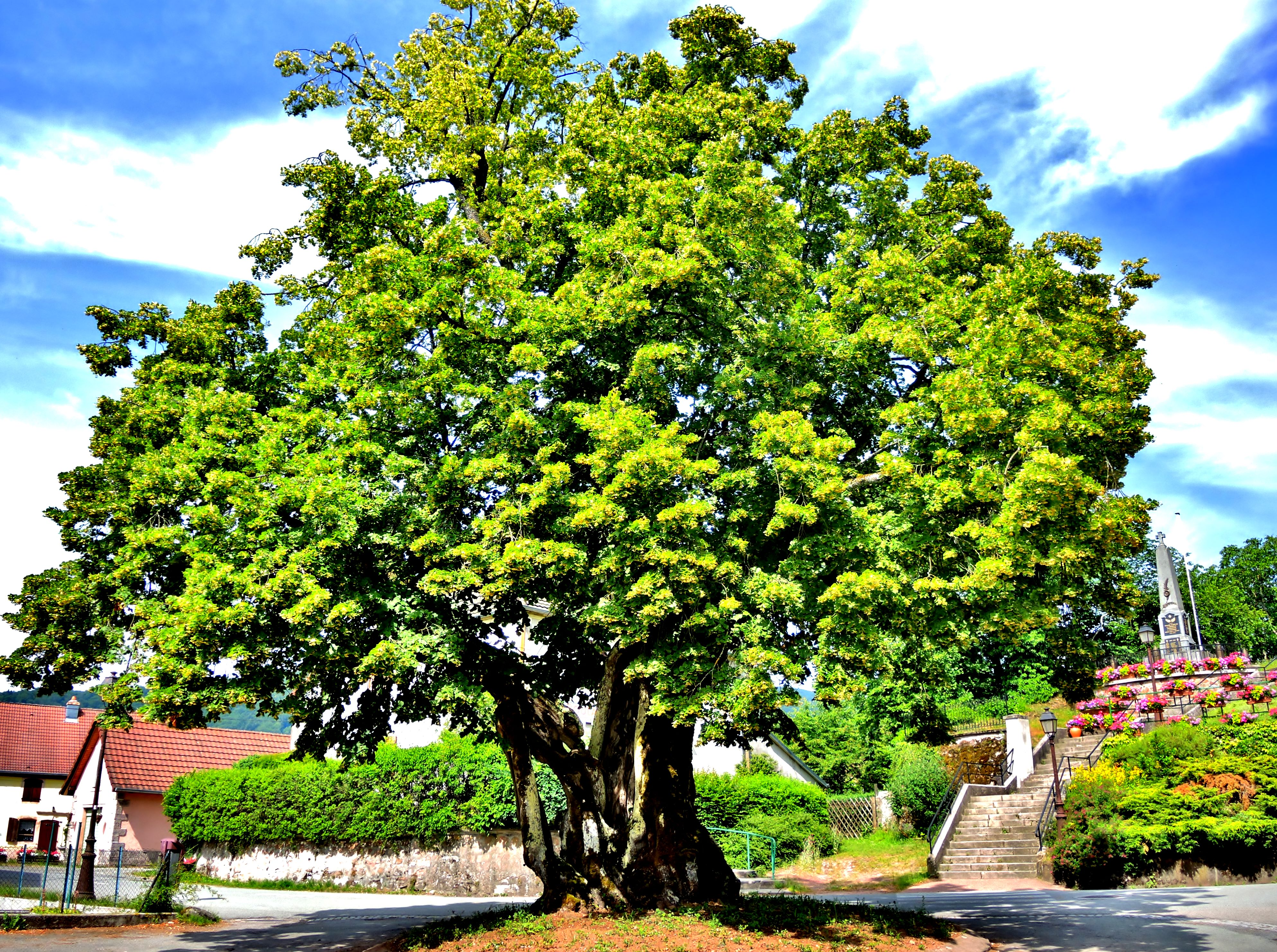 Le tilleul pluri centenaire de Rougegoutte. Territoire de Belfort